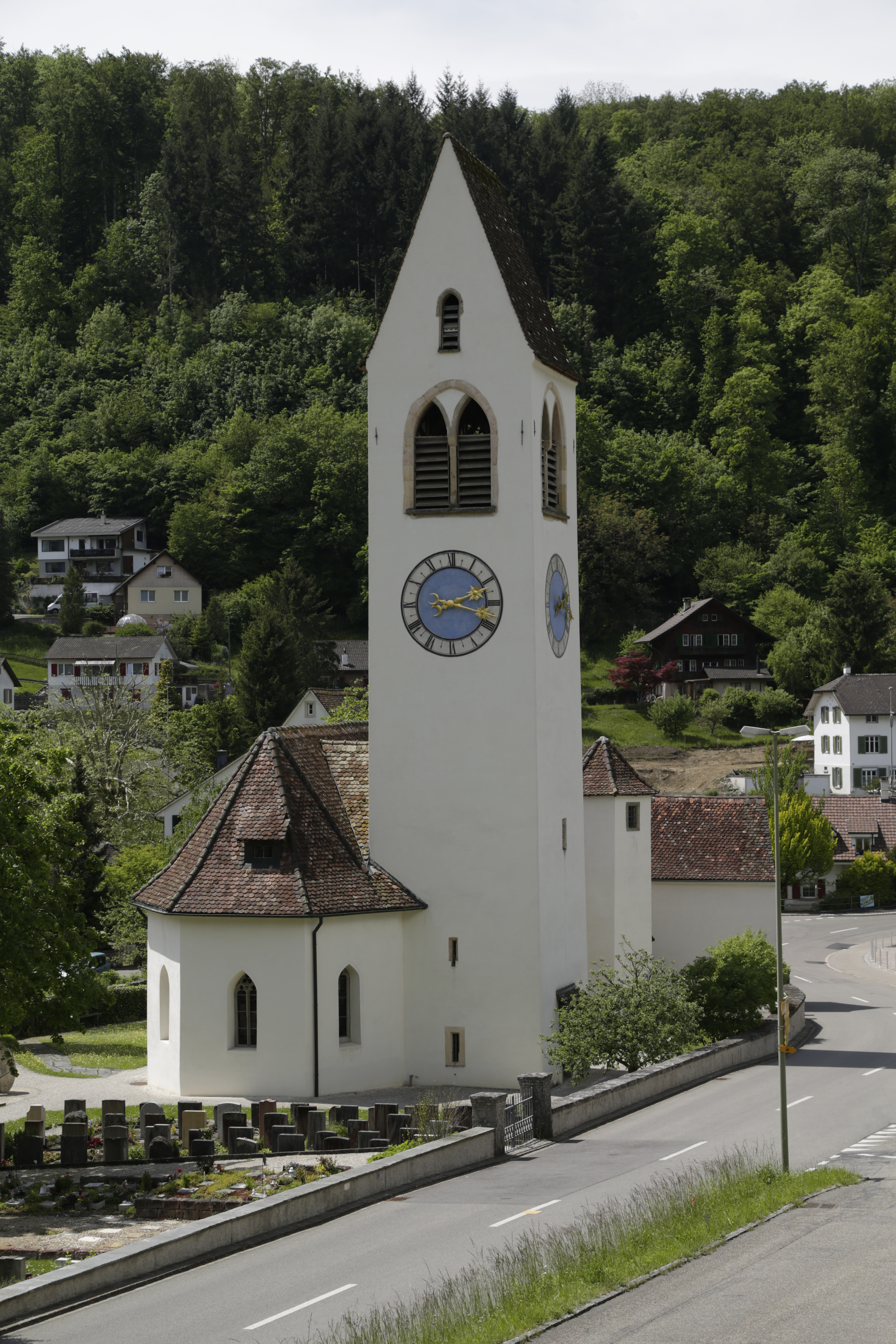 Die reformierte Pfarrkirche von Rümlingen.